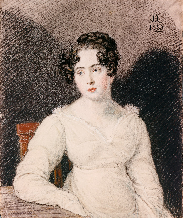 Софья Осиповна Вельо (1793—1840) — фаворитка Александра I, жена генерала А. М. Ребиндера.